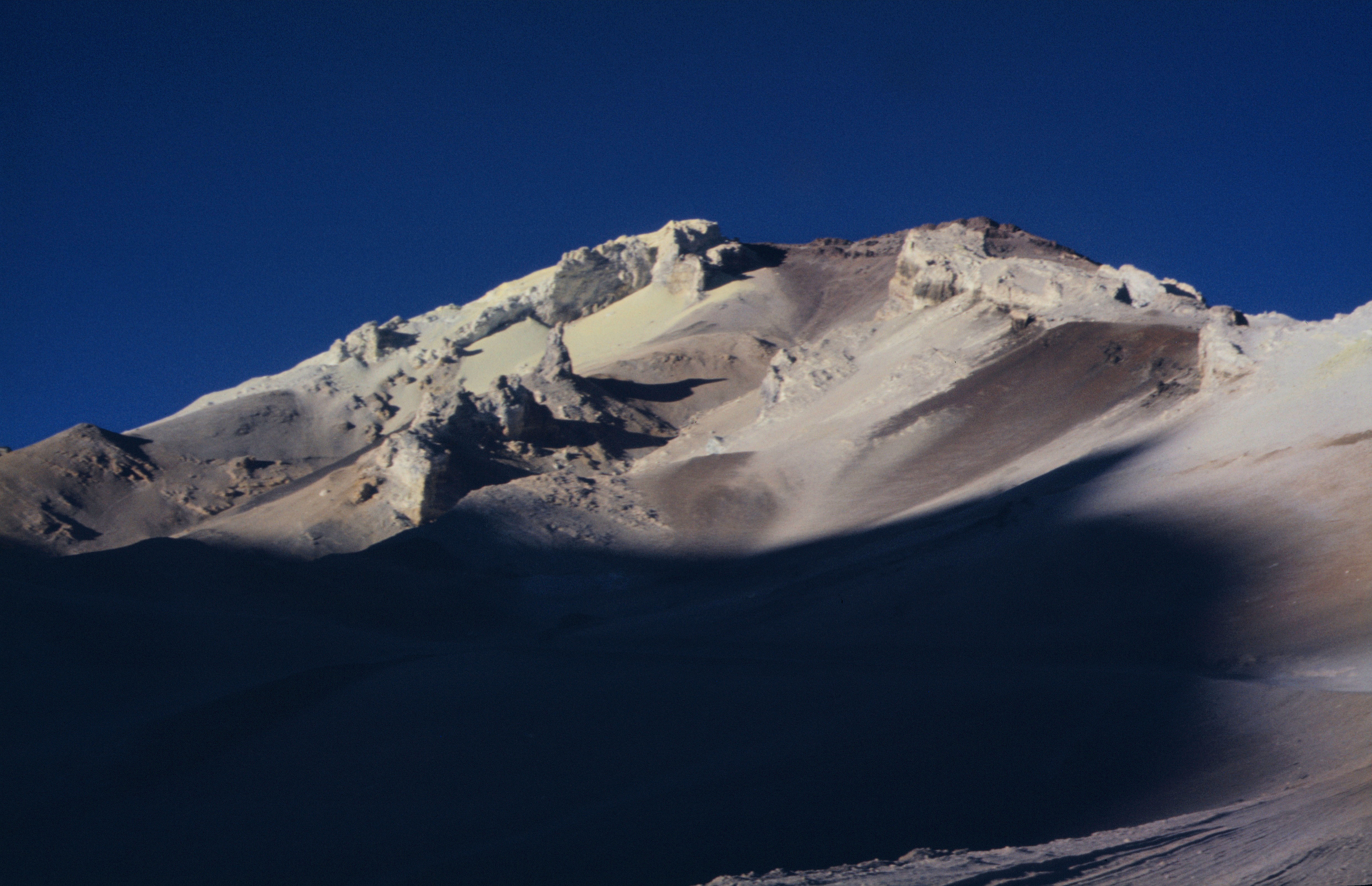 Sulfur deposit on Cerro Escorial